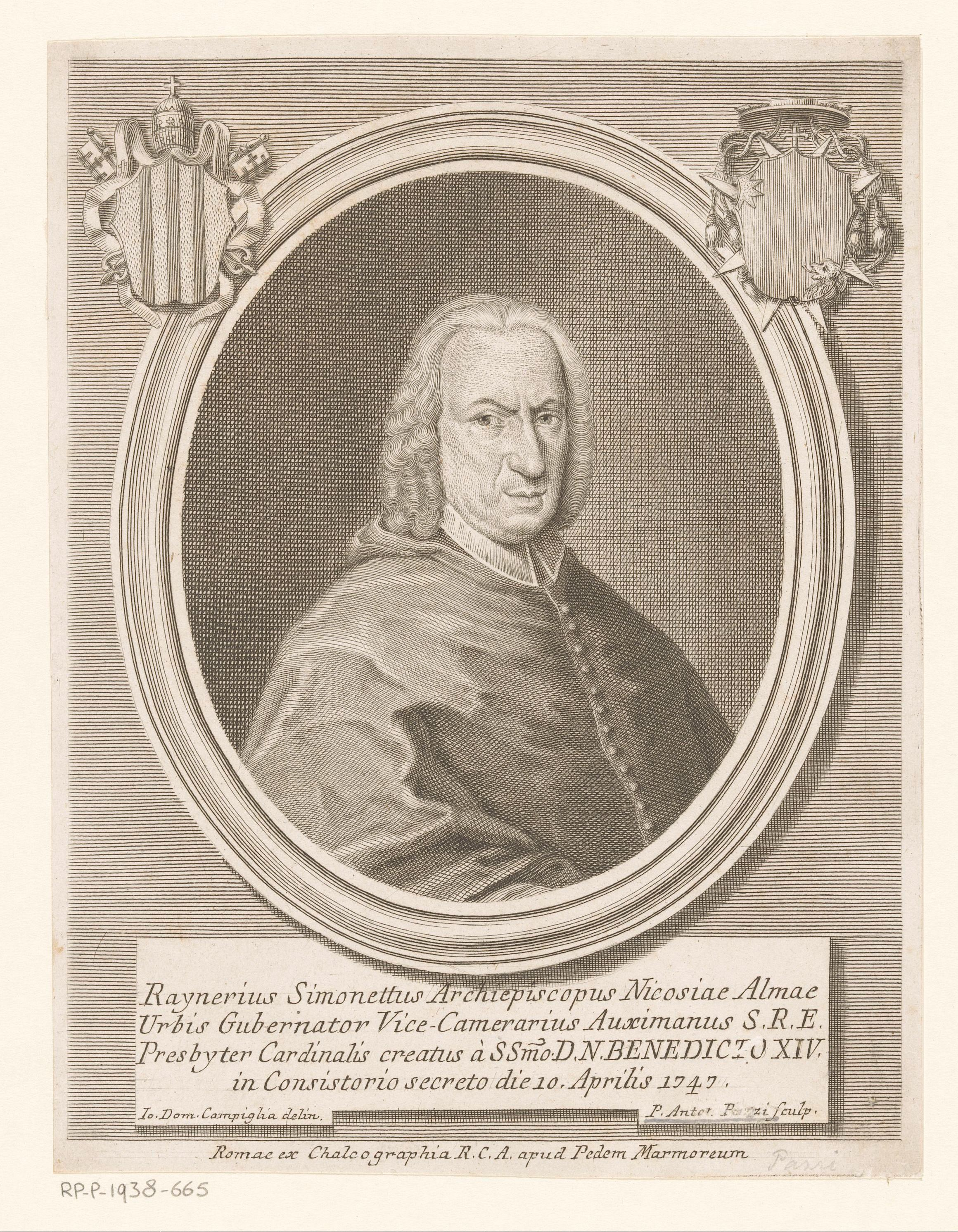 IdentificatieTitel(s): Portret van kardinaal Raniero Felice SimonettiPortretten van kardinalen met twee wapenschilden (serietitel)Effigies (serietitel)Objecttype: prent Objectnummer: RP-P-1938-665Opschriften / Merken: verzamelaarsmerk, verso, gestempeld: Lugt 2228Omschrijving: Linksboven en rechtsboven een wapenschild.VervaardigingVervaardiger: prentmaker: Antonio Pazzi (vermeld op object)naar tekening van: Giovanni Domenico Campiglia (vermeld op object)uitgever: Calcographia R.C.A. (vermeld op object)Plaats vervaardiging: prentmaker: Italiënaar tekening van: Italiëuitgever: RomeDatering: 1747 - na 1768Fysieke kenmerken: ets en gravure, bewerkt met pen in grijsMateriaal: papier inkt Techniek: graveren (drukprocedé) / etsen / penAfmetingen: blad: h 220 mm (Binnen plaatrand afgesneden.) × b 170 mm (Binnen plaatrand afgesneden.)ToelichtingPrent uit een reeks van onbekende omvang met portretten van kardinalen. De prenten werden vanaf 1657 vervaardigd in opdracht van uitgever Giovanni Giacomo de’ Rossi, Waar: na de productie werd voortgezet onder leiding van zijn opvolgers Domenico de’ Rossi en Lorenzo Filippo de’ Rossi, en ten slotte onder leiding van de Calcographia R.C.A.OnderwerpWat: historical personscardinalWie: Raniero Felice SalmonettiVerwerving en rechtenCredit line: Schenking van de heer D.H. Cevat, GuernseyVerwerving: schenking 1938Copyright: Publiek domein